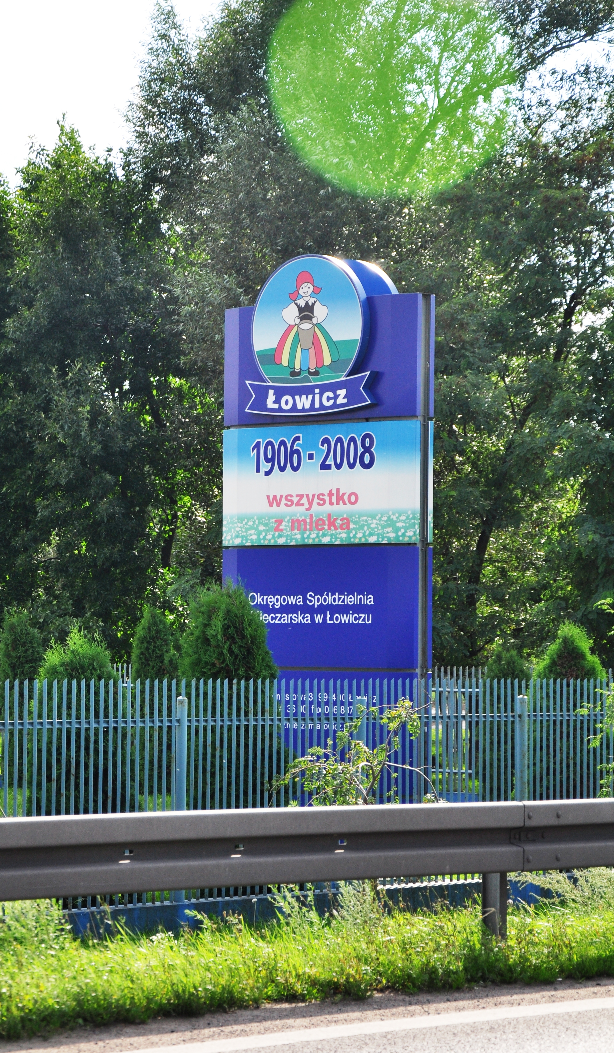 Lowicz, Dairy Producer Lowicz